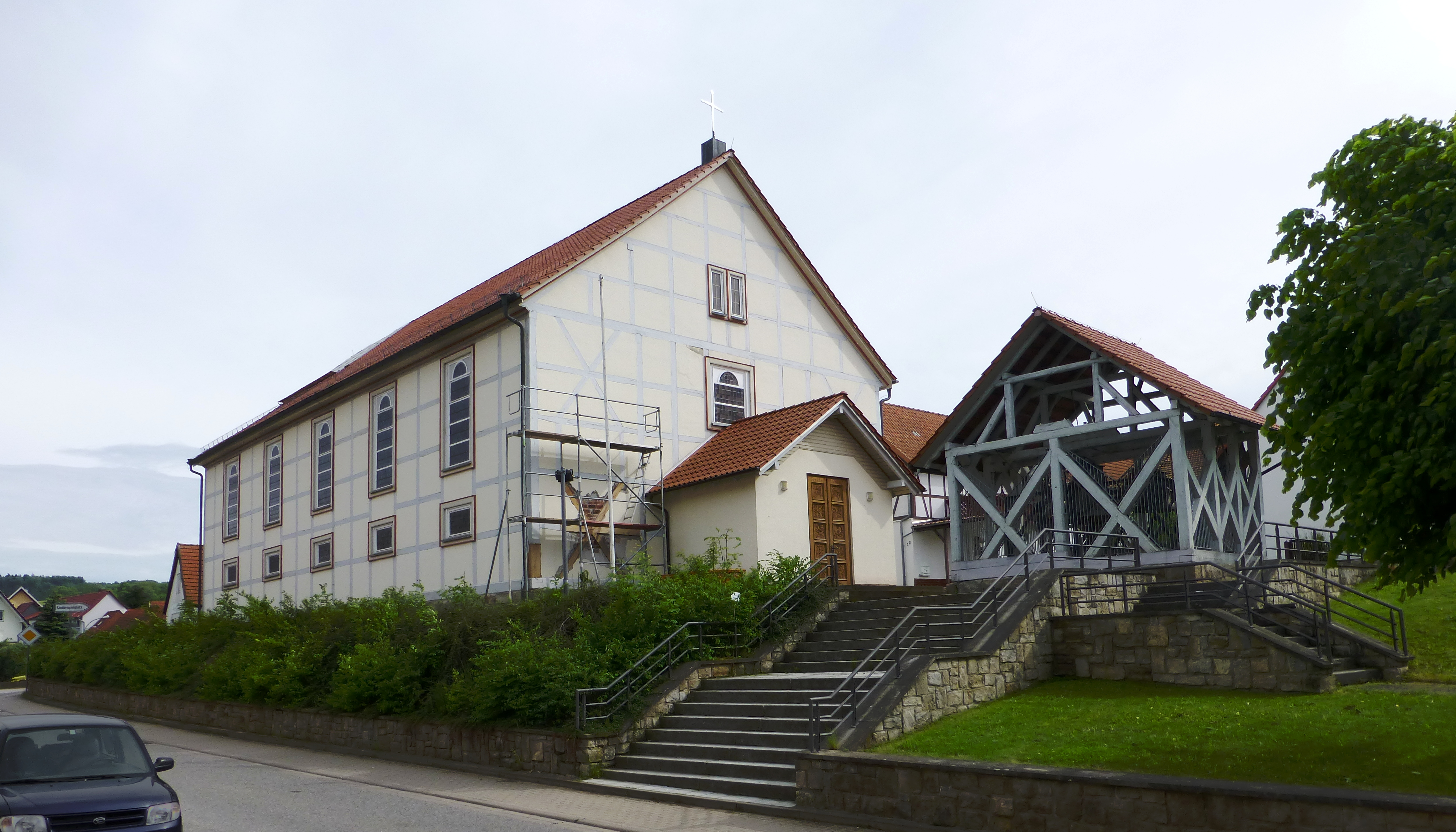 Römisch-katholische Kirche St. Dionysius in Hundeshagen, Landkreis Eichsfeld, Thüringen